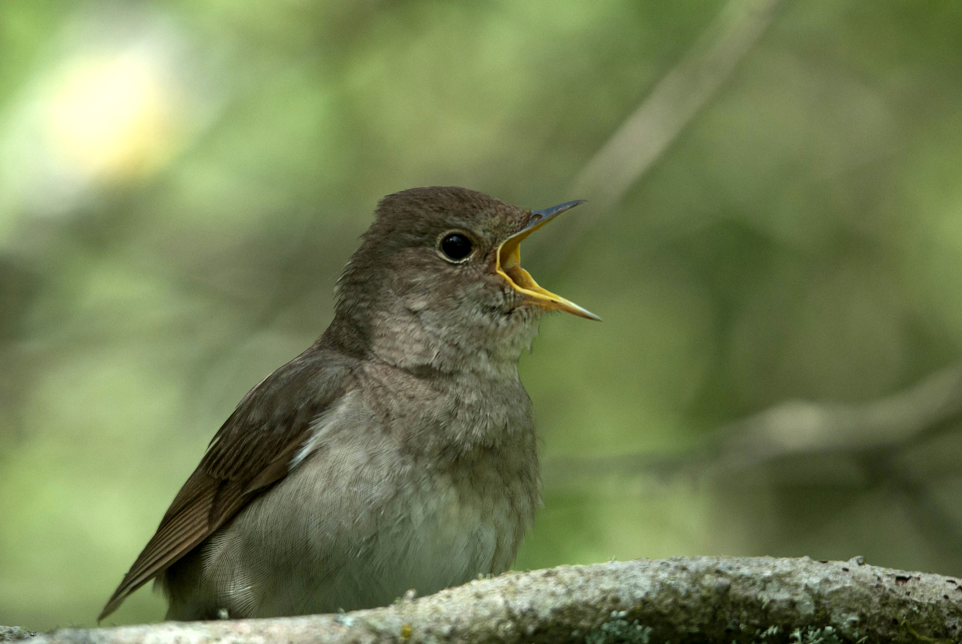 Ööbik Luscinia luscinia juunikuus, Saaremaal.